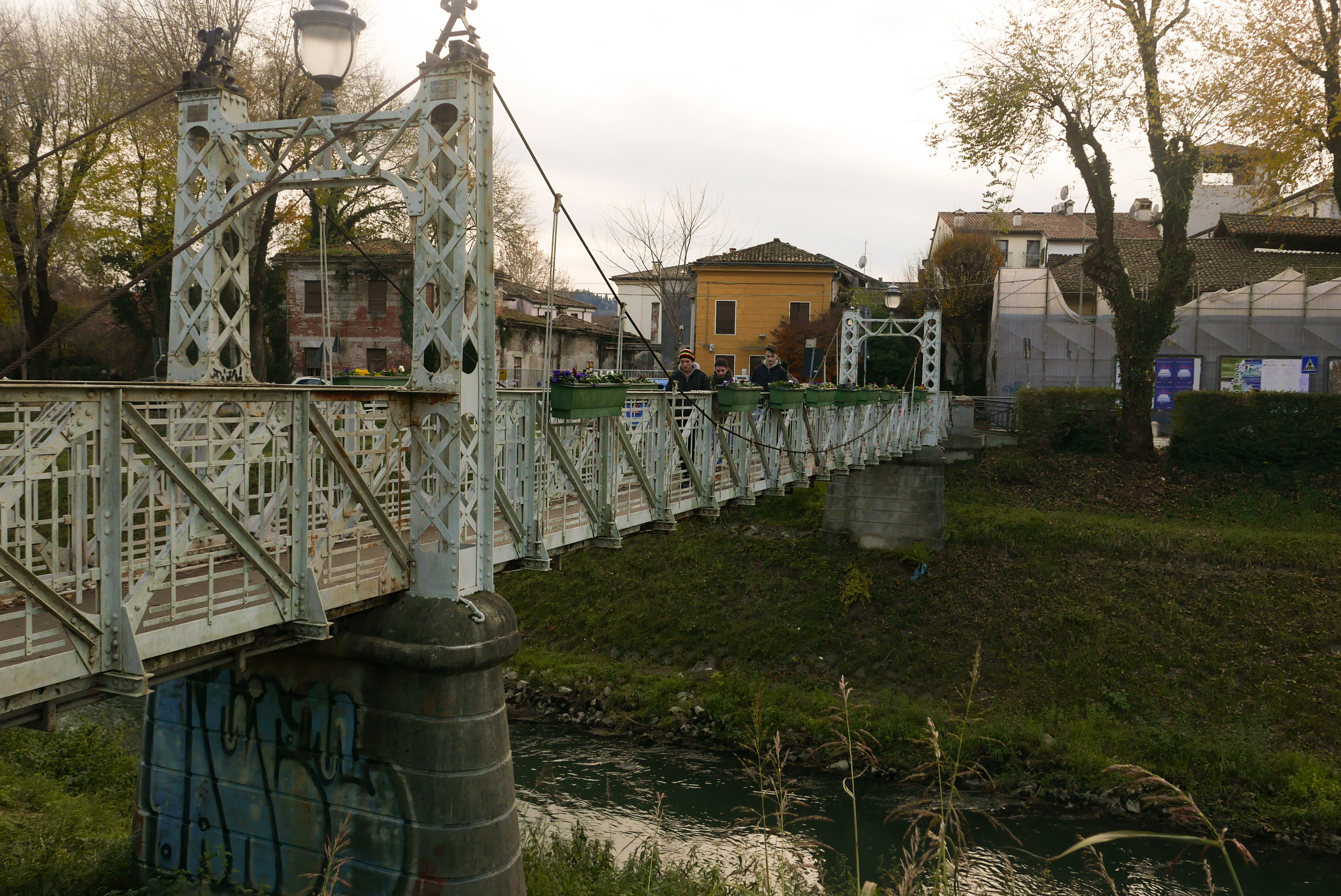 Ponte di ferro sul Bacchiglione